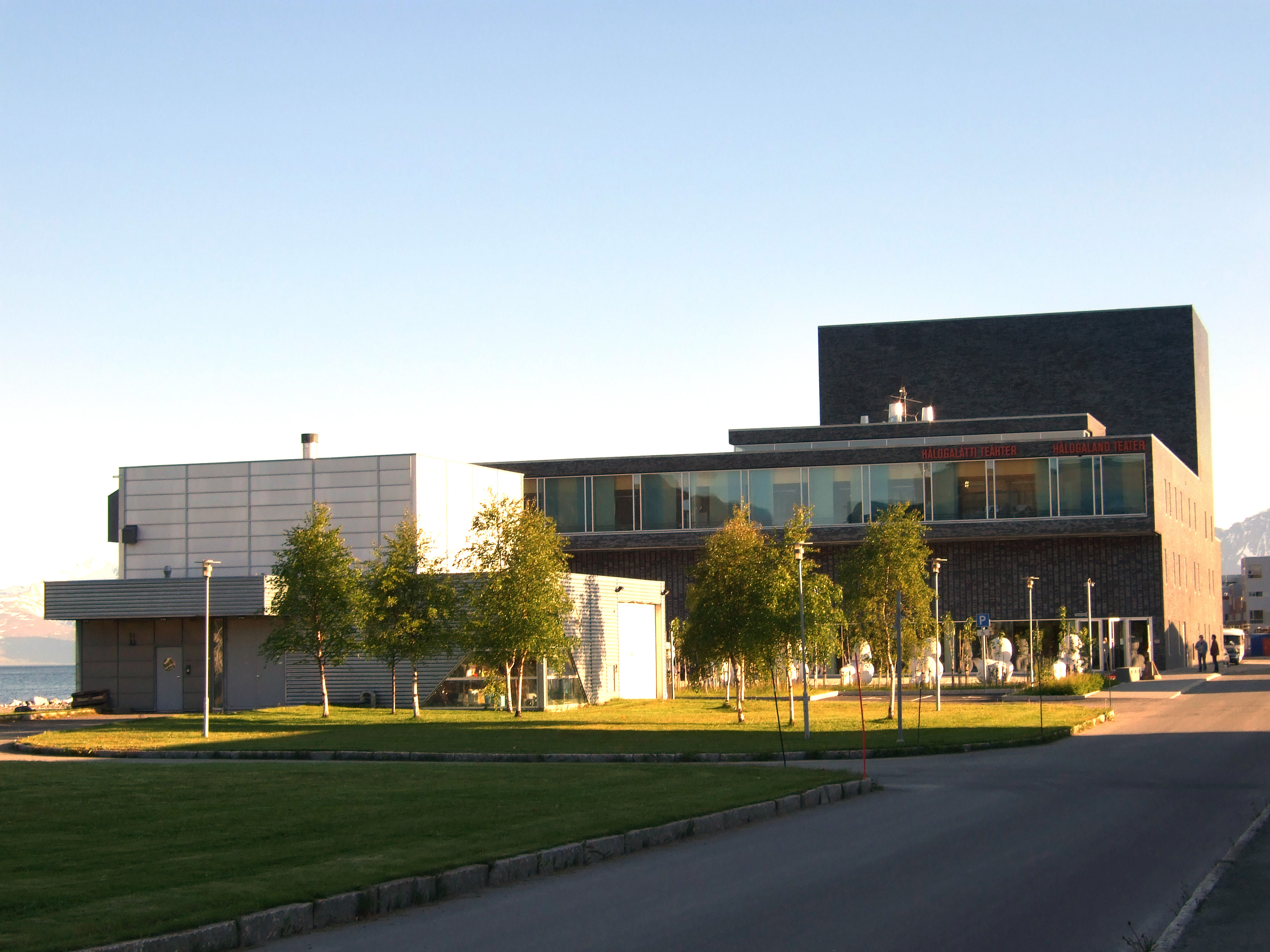 Hålogaland Teater in Tromsø